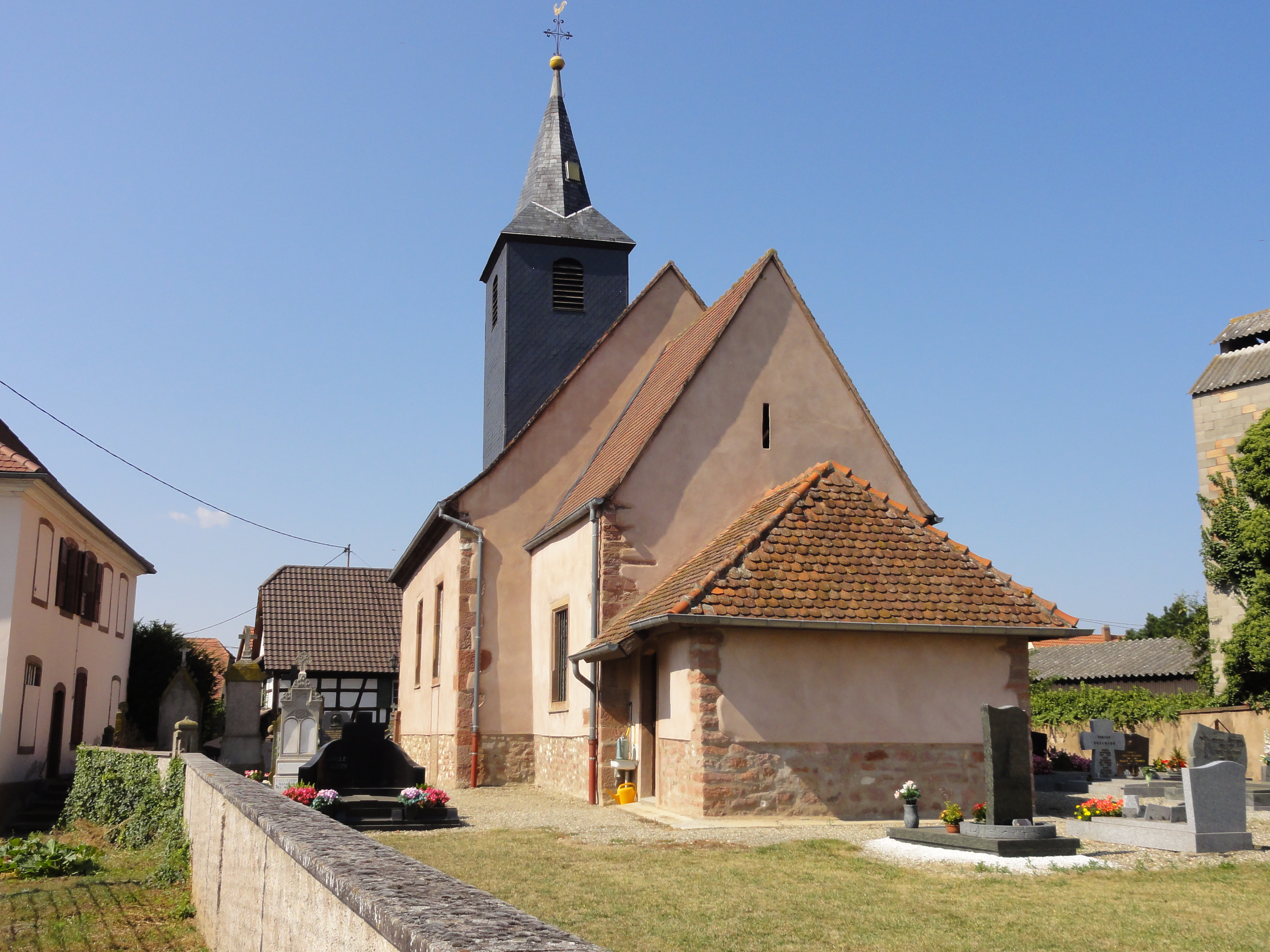 Alsace, Bas-Rhin, Dossenheim-Kochersberg, Église Saints-Pierre-et-Paul